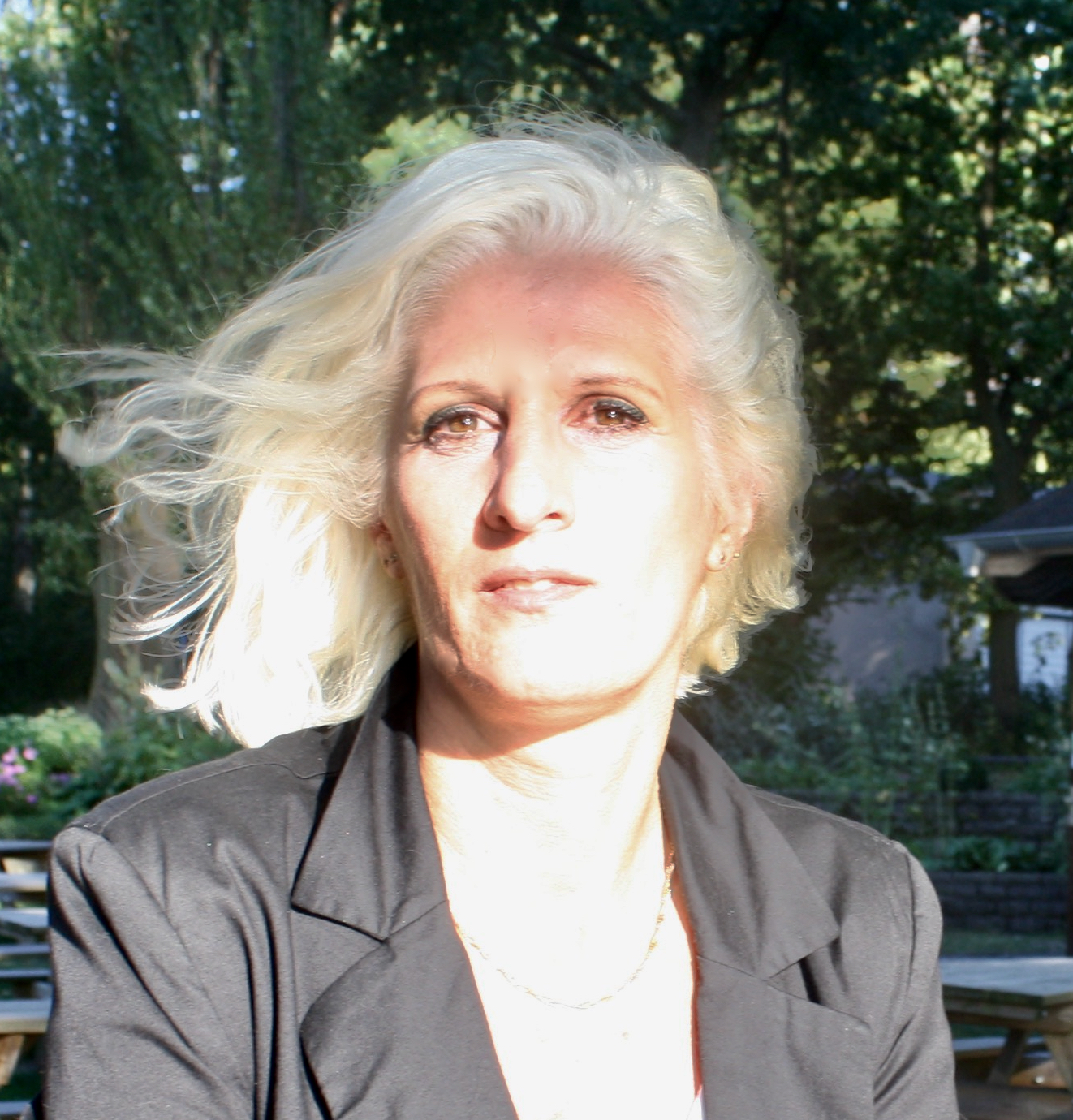 Heike Franke (Autorin), Bild-by Heike Franke